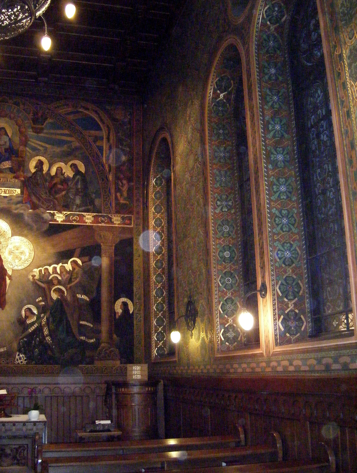 Pázmáneumi kapelle